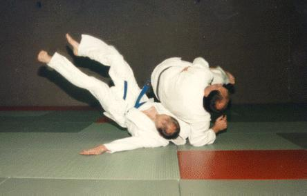 Picture shows a dynamic soto-maki-komi